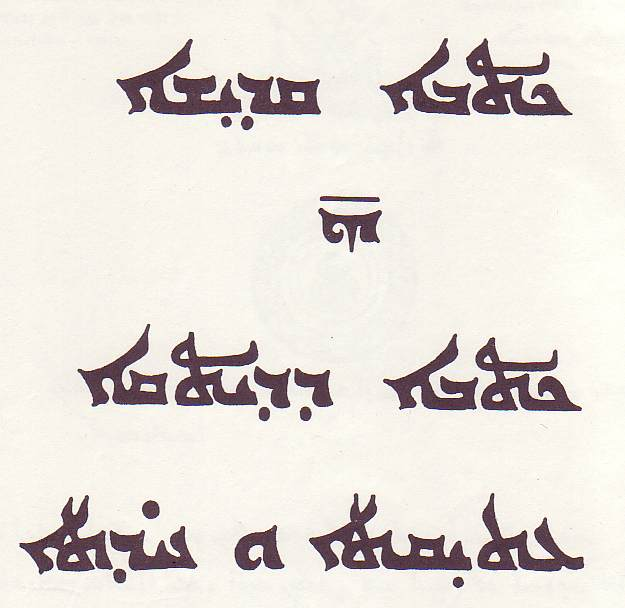 Fontispis syrské Bible UBS 1979/1996